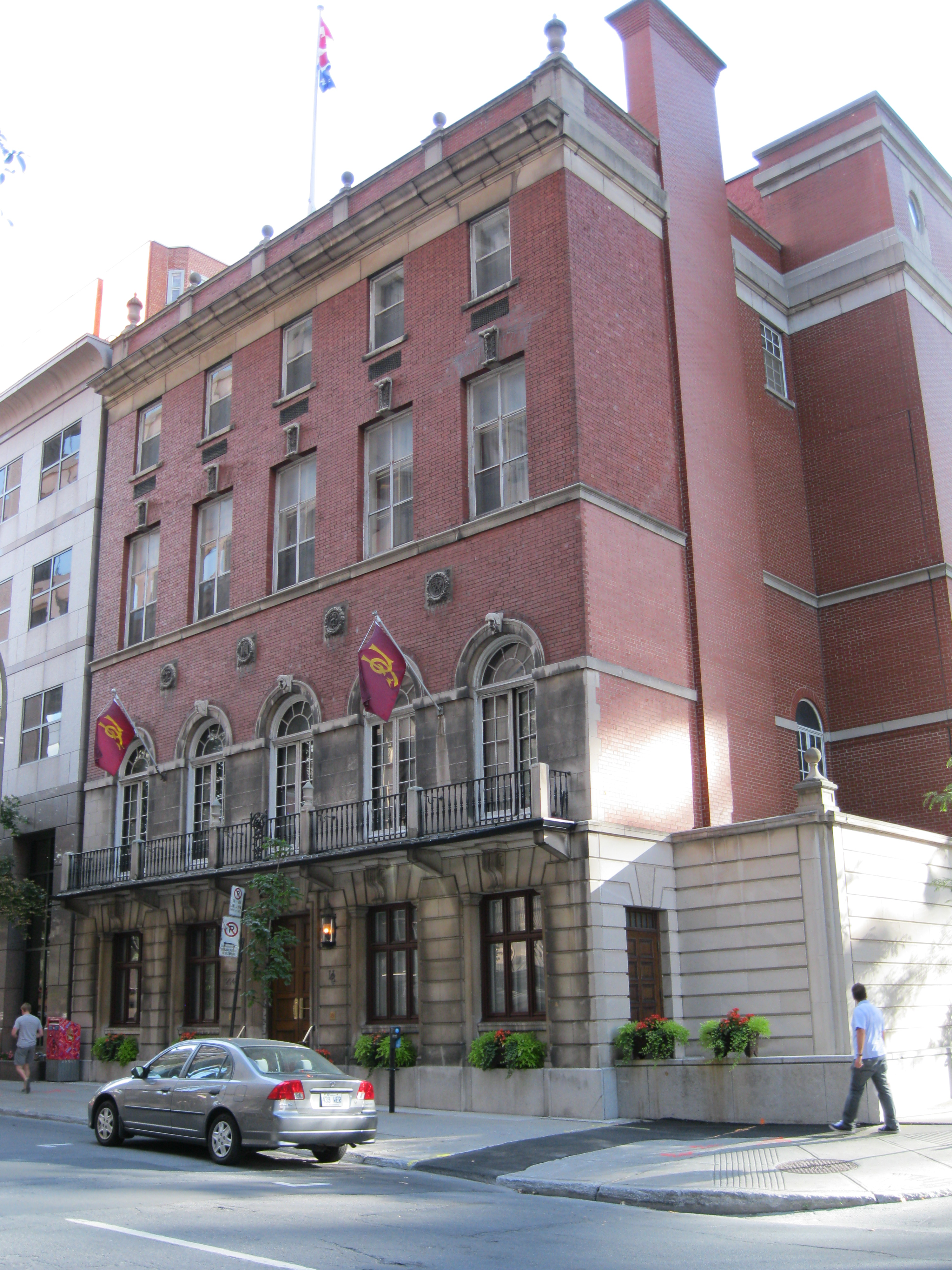 Édifice du Club-Universitaire-de-Montréal, 2047, rue Mansfield, Montréal